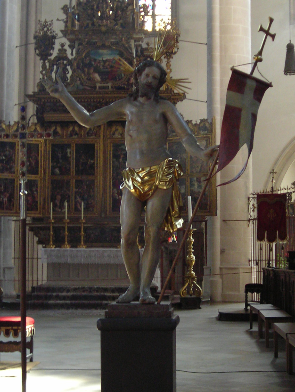 Jesus-Figur im Münster Zur Schönen Unserer Lieben Frau (Ingolstadt)